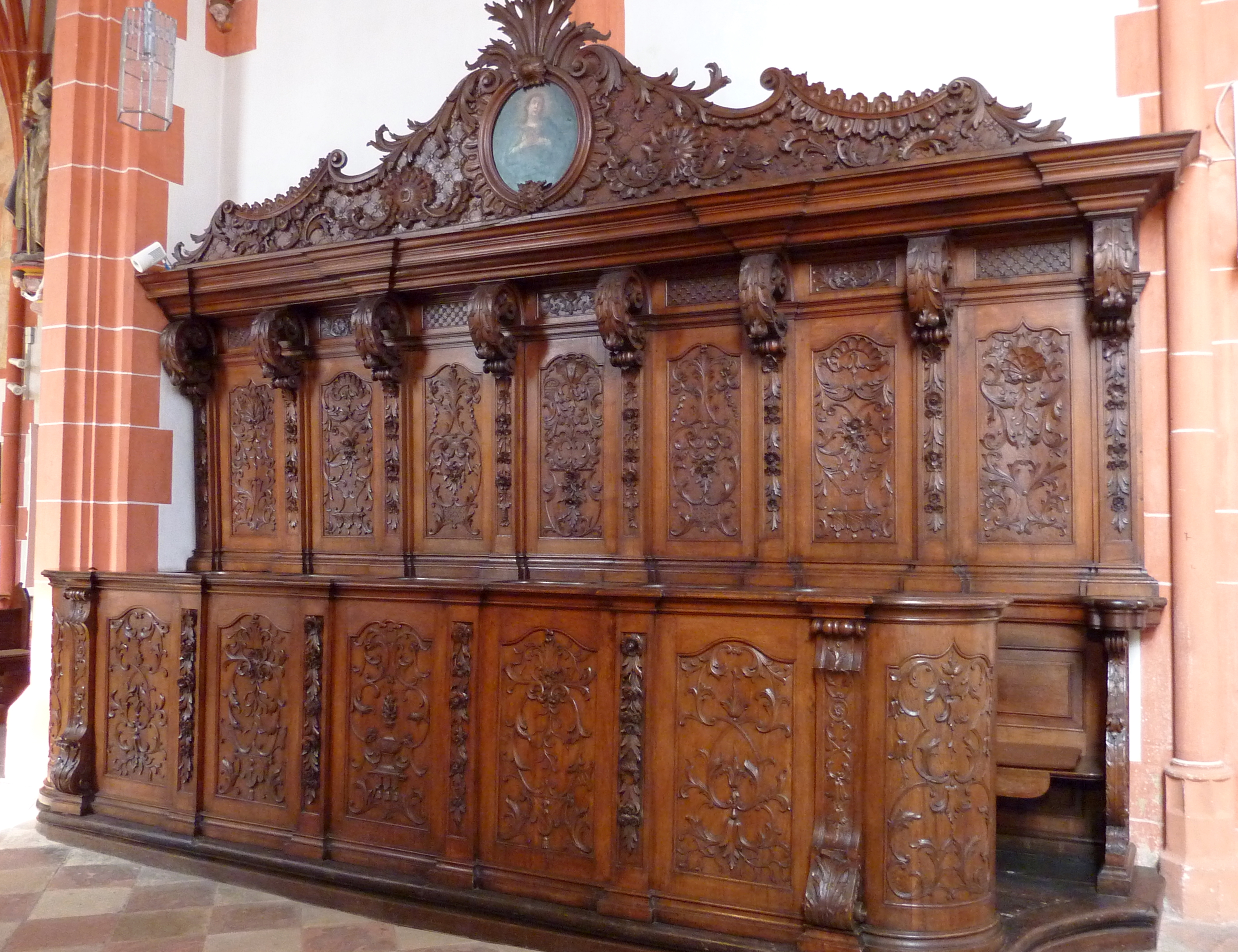 Stiftskapelle des St. Nikolaus-Hospitals (Cusanusstift) in Bernkastel-Kues im Landkreis Bernkastel-Wittlich (Rheinland-Pfalz), Chorgestühl, aus der Mitte des 18. Jahrhunderts